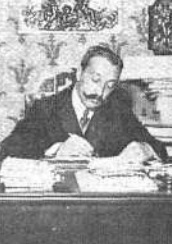 Señor Carlos Prast, diputado á cortes y presidente de la Cámara de Comercio, Industria y Navegación de Madrid